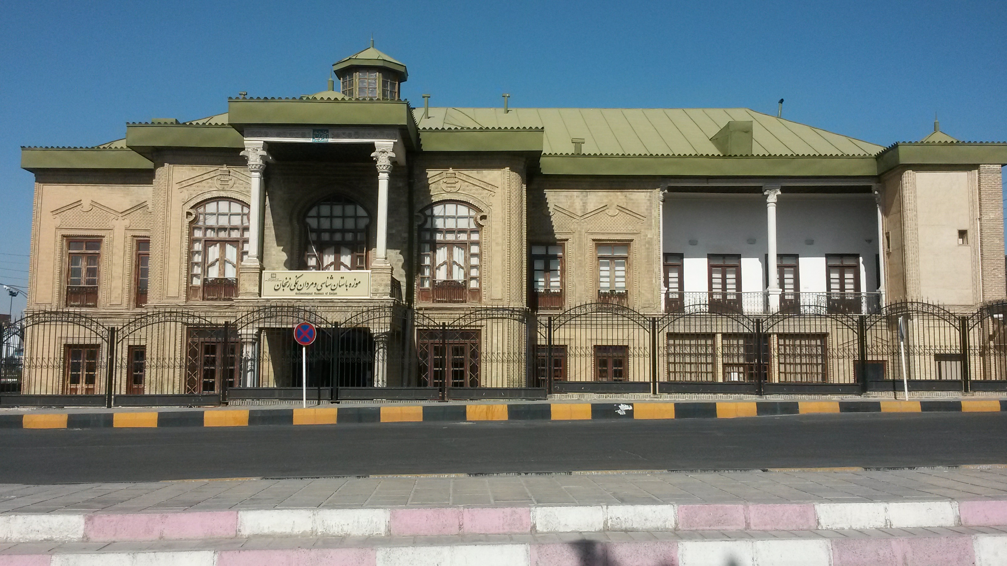 بنای تاریخی ذوالفقاری یا خانه ذوالفقاری یا عمارت ذوالفقاری مربوط به دوره قاجار است و در زنجان، خیابان طالقانی جای گرفته است. این اثر در تاریخ ۲۵ اسفند ۱۳۷۵ با شمارهٔ ثبت ۱۸۵۲ به‌عنوان یکی از آثار ملی ایران به ثبت رسیده است